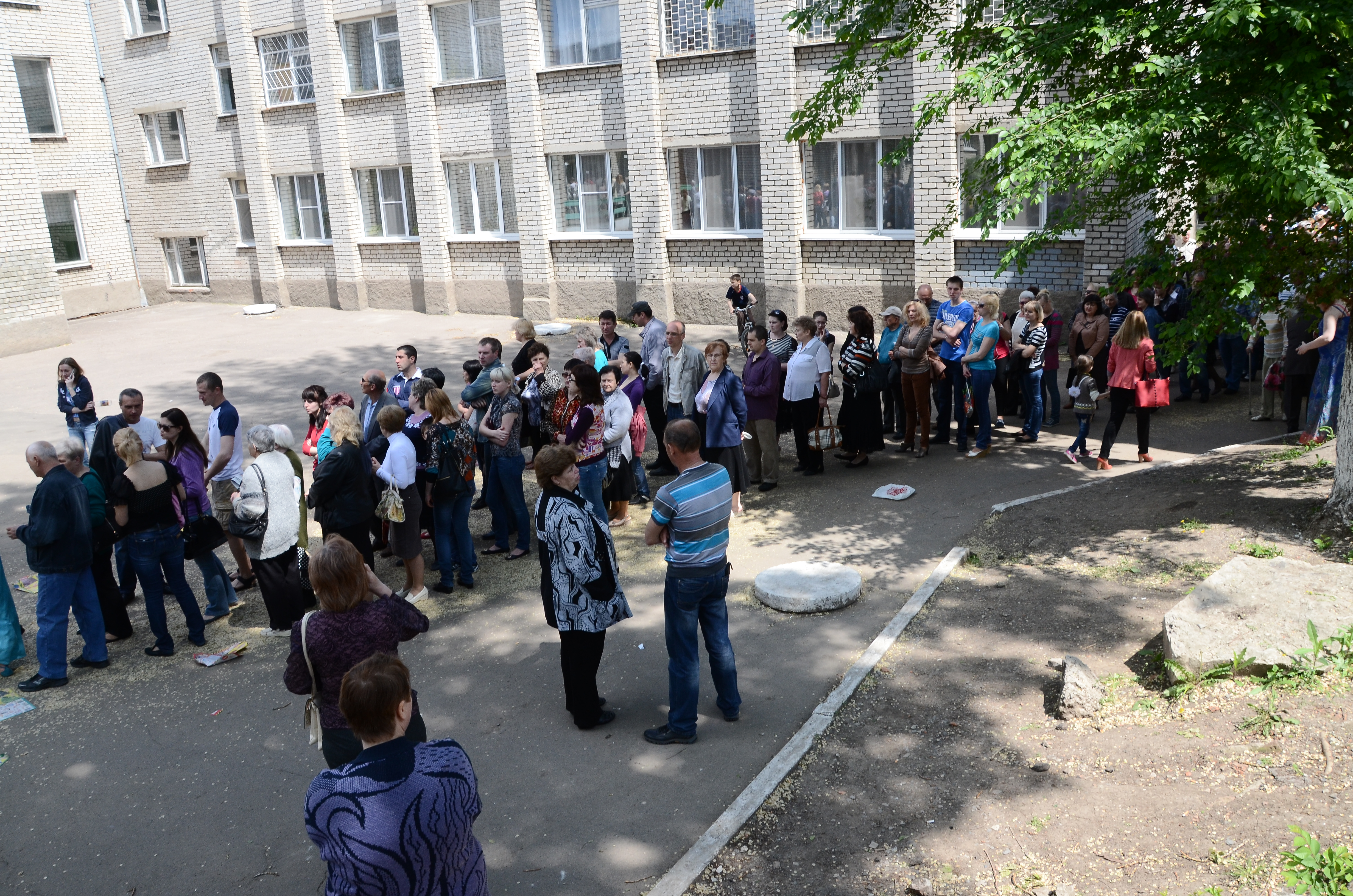 Референдум в Донецке